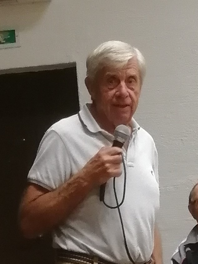 Porträtt av Ingemar Lind, känd svensk naturfilmare